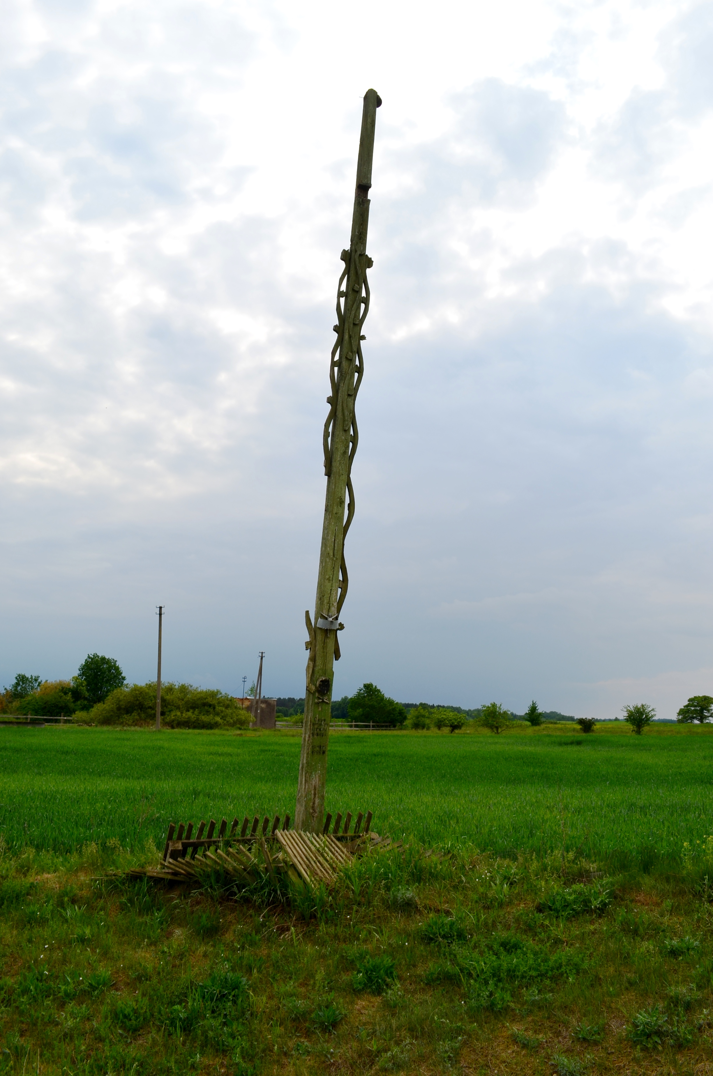 Meiliškiai, Raseinių r.